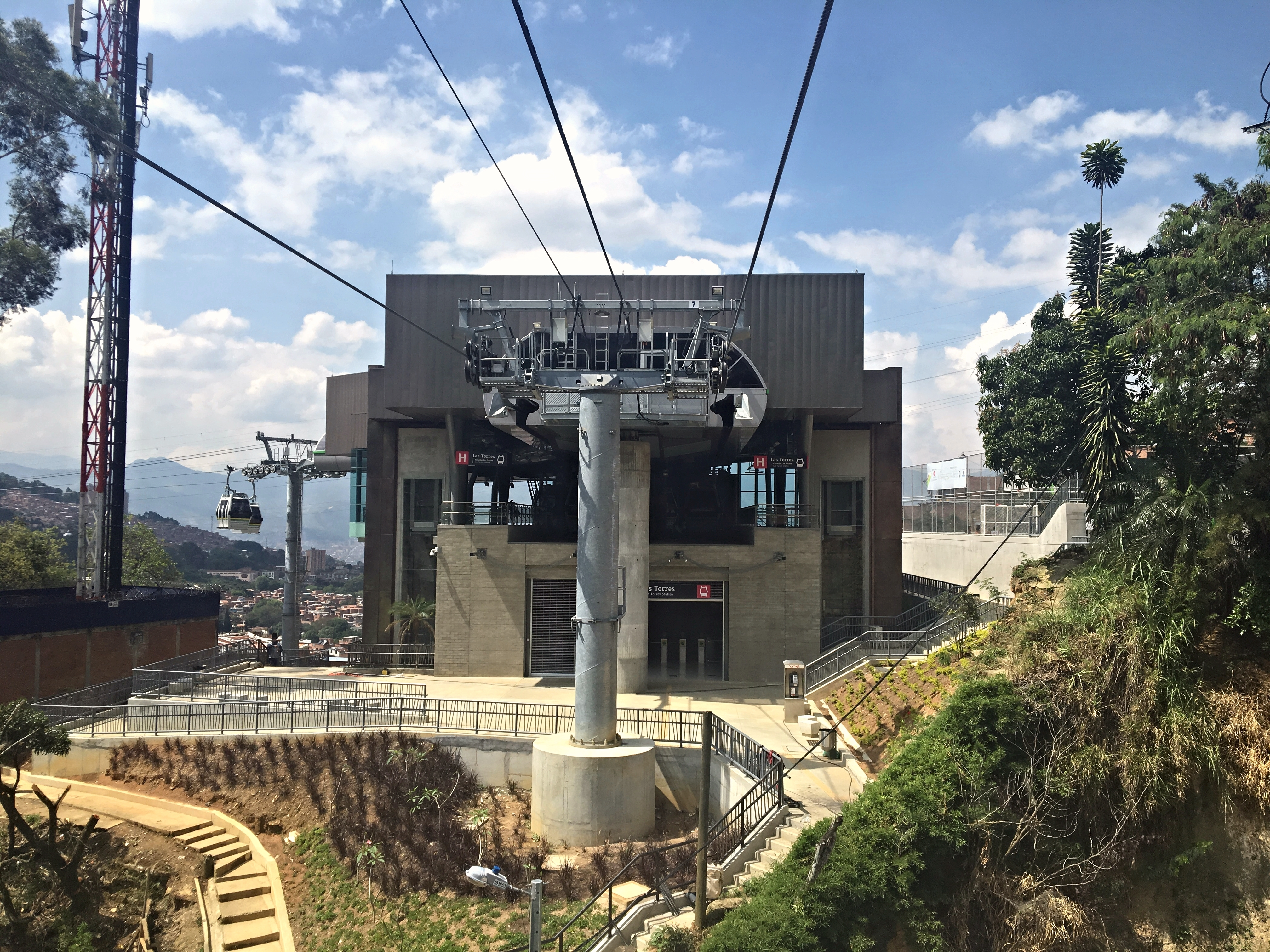 Estación Las Torres (Metro de Medellín)